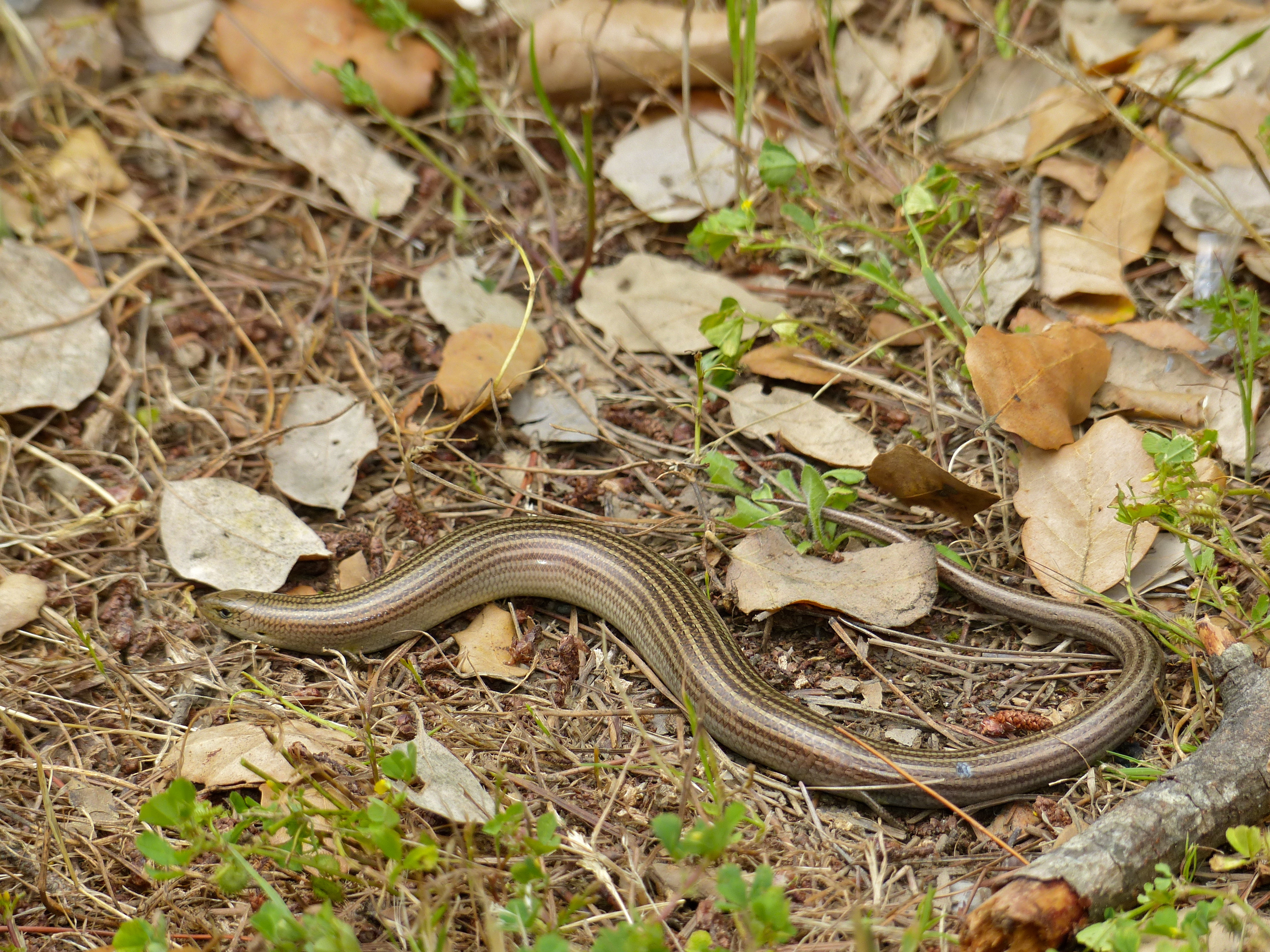 Road to Aniezo, Cabezón de Liébana, Cantabria, Spain